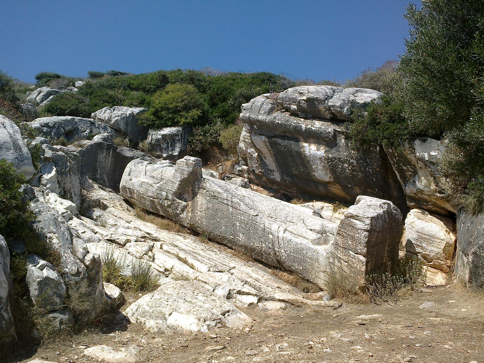 Cyclades Naxos Apollonas Kouros